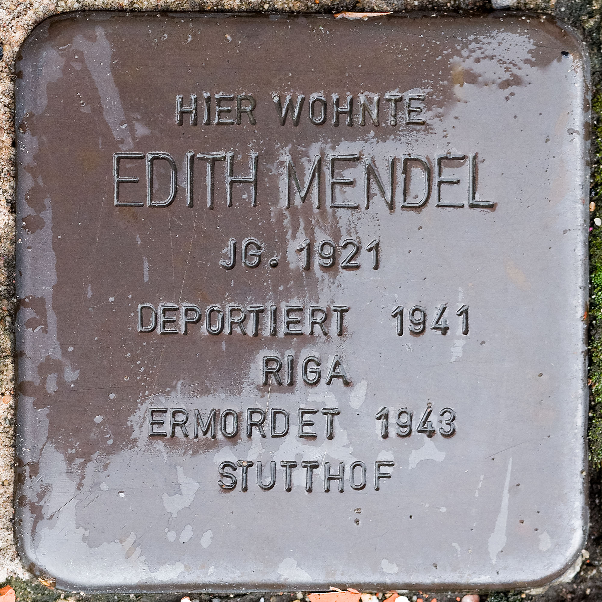 Stolpersteine Straelen: Mendel, Edith